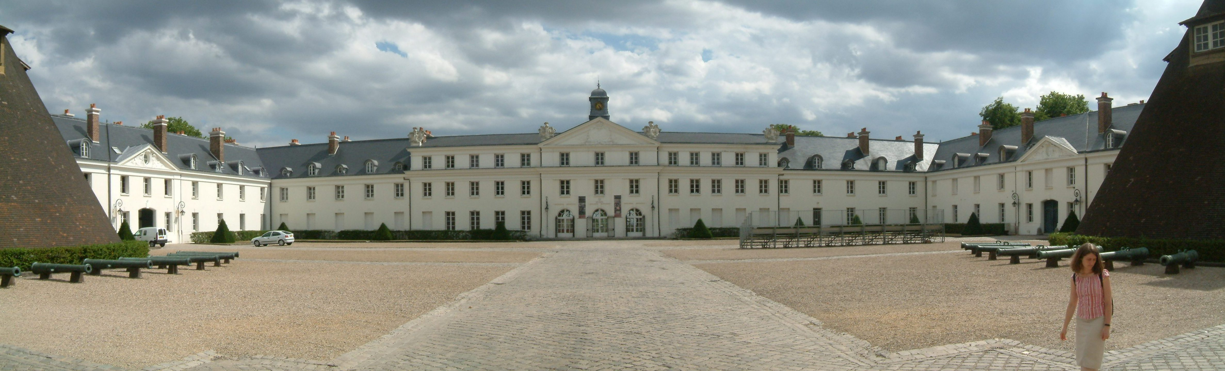 Château de la Verrerie, vue de la cour intérieur. Le Creusot, Bourgogne, FRANCE